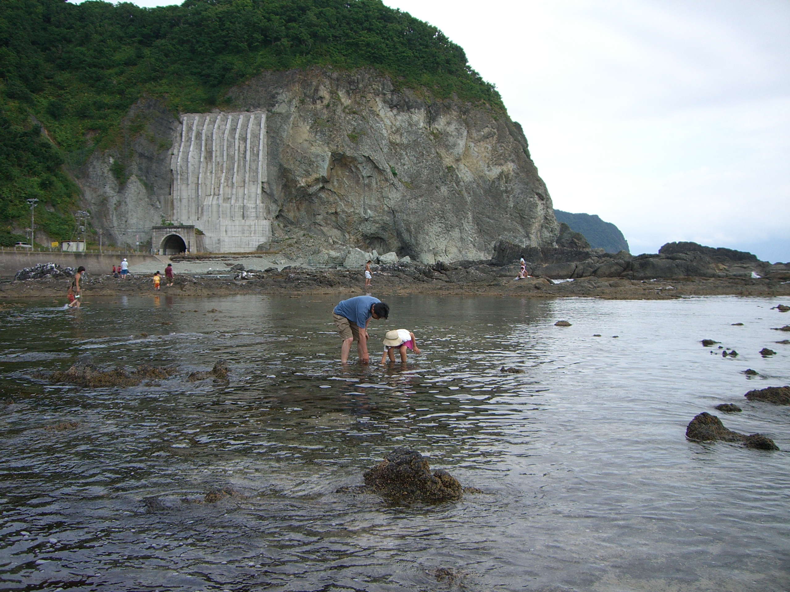 syakotan-盃海岸（積丹）